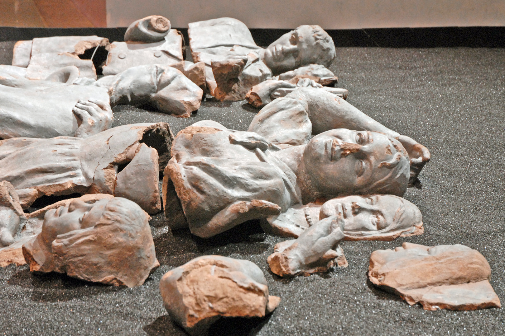 Fragments de bas-reliefs représentant les peuples de l'URSS du pavillon soviétique de l'exposition internationale de 1937, découverts lors d'une fouille par les archéologues de l'INRAP à Baillet-en-France, Val d'Oise. Situé devant la Tour Eiffel, ce pavillon faisait face à celui de l'Allemagne nazie, préface prémonitoire de l'affrontement qui a suivi. Joseph Tchaikov, sculpteur ukrainien (1888-1986) Béton armé, 1937 Fragments présentés à la Cité de la musique à l'occasion de l'exposition "Lénine, Staline et la musique"